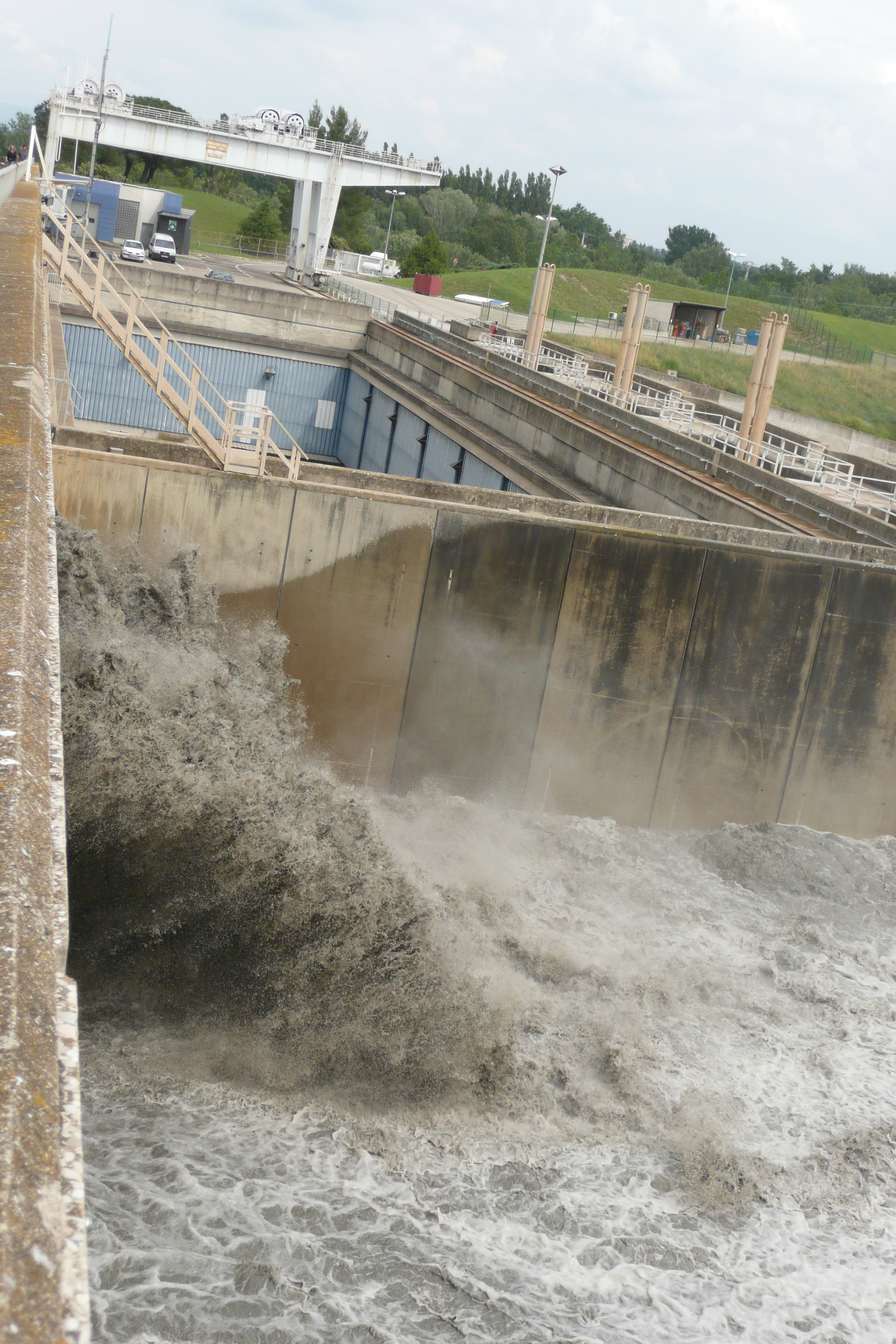 Chute d'eau Compagnie nationale du Rhône, 1973, usine écluse d'Avignon.